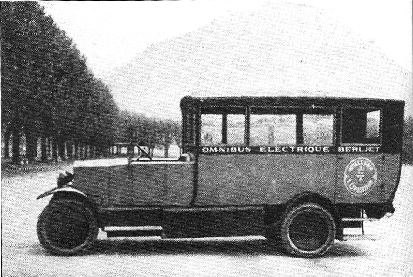 Omnibus électrique sur l'esplanade de Grenoble pour transporter les visiteurs de l'exposition internationale de la houille blanche en 1925.